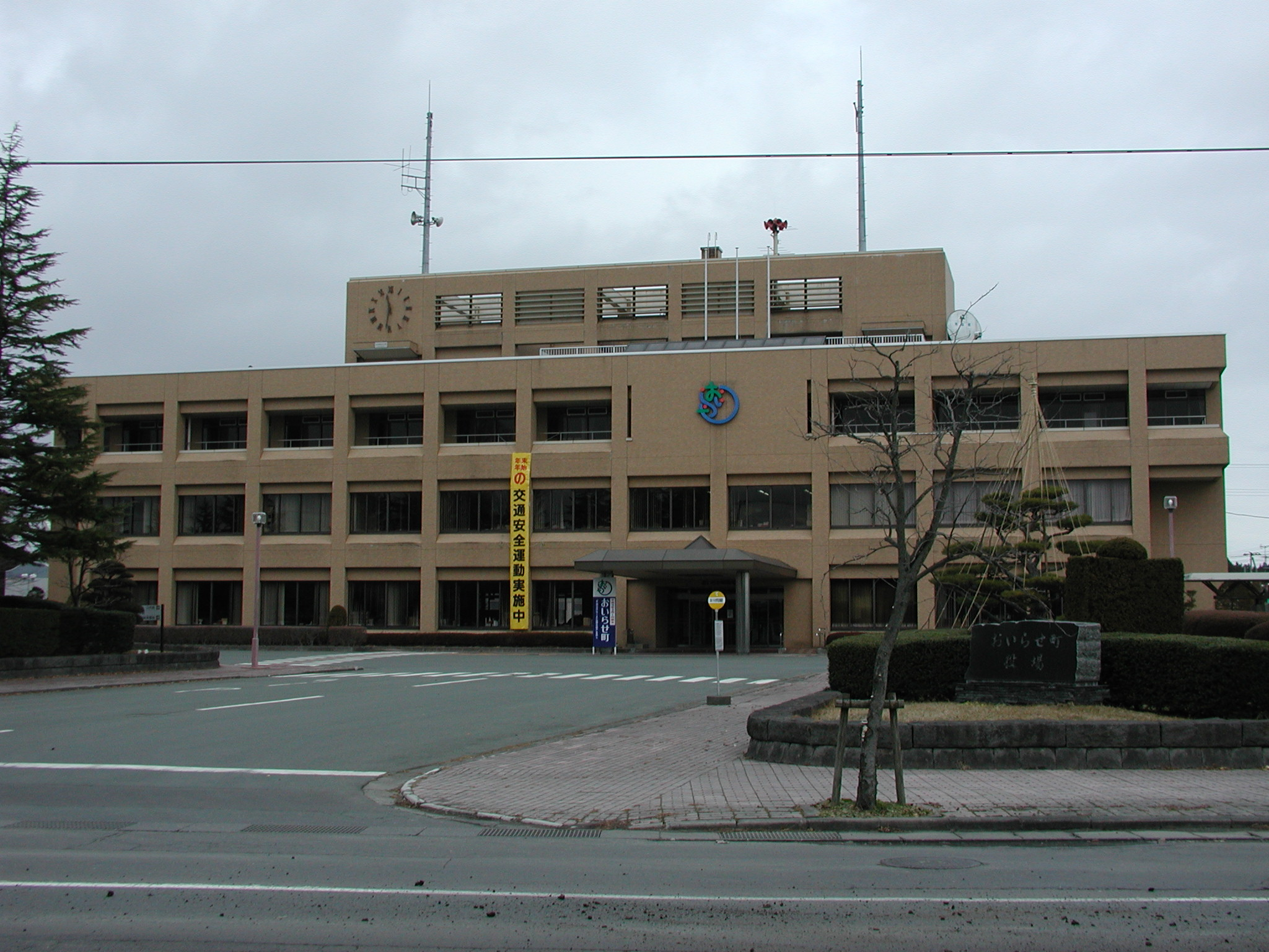 おいらせ町役場 本庁舎（旧：下田町役場）